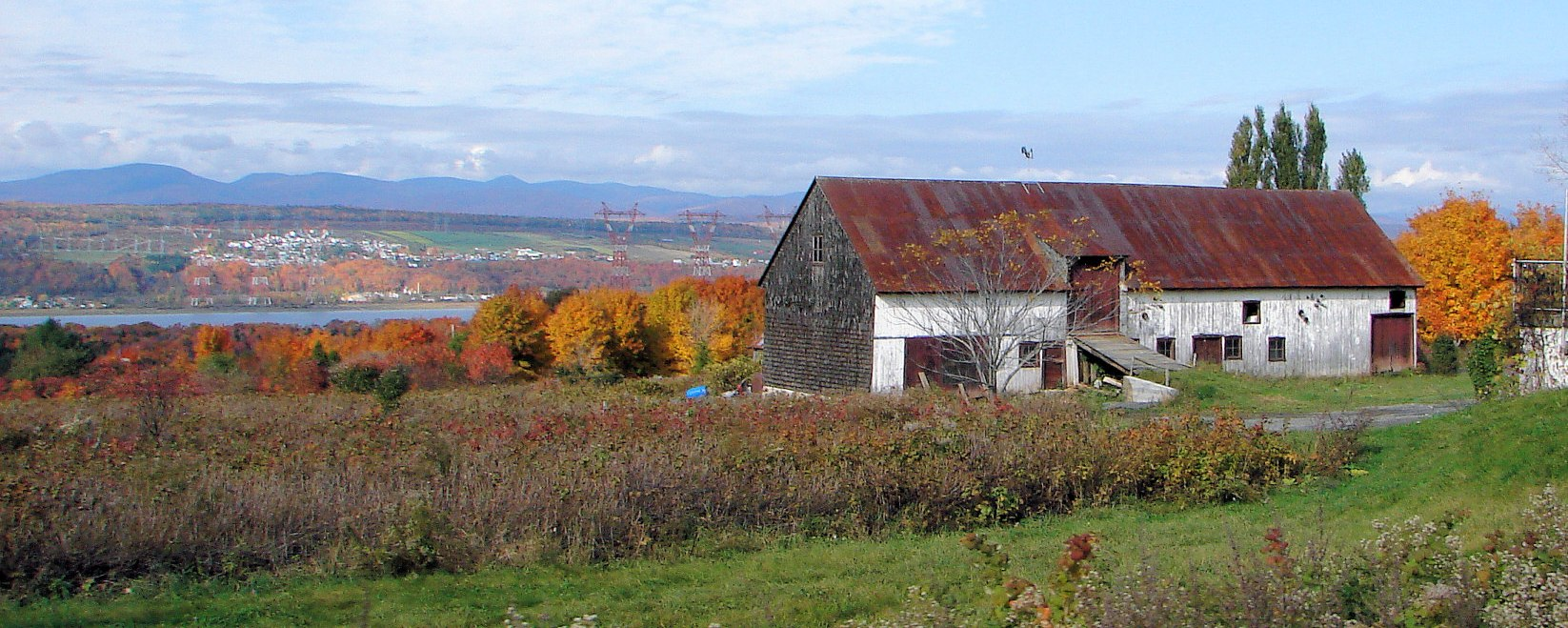 Saint-Pierre-de-l'Île-d'Orléans, Île d'Orléans, Québec, Canada